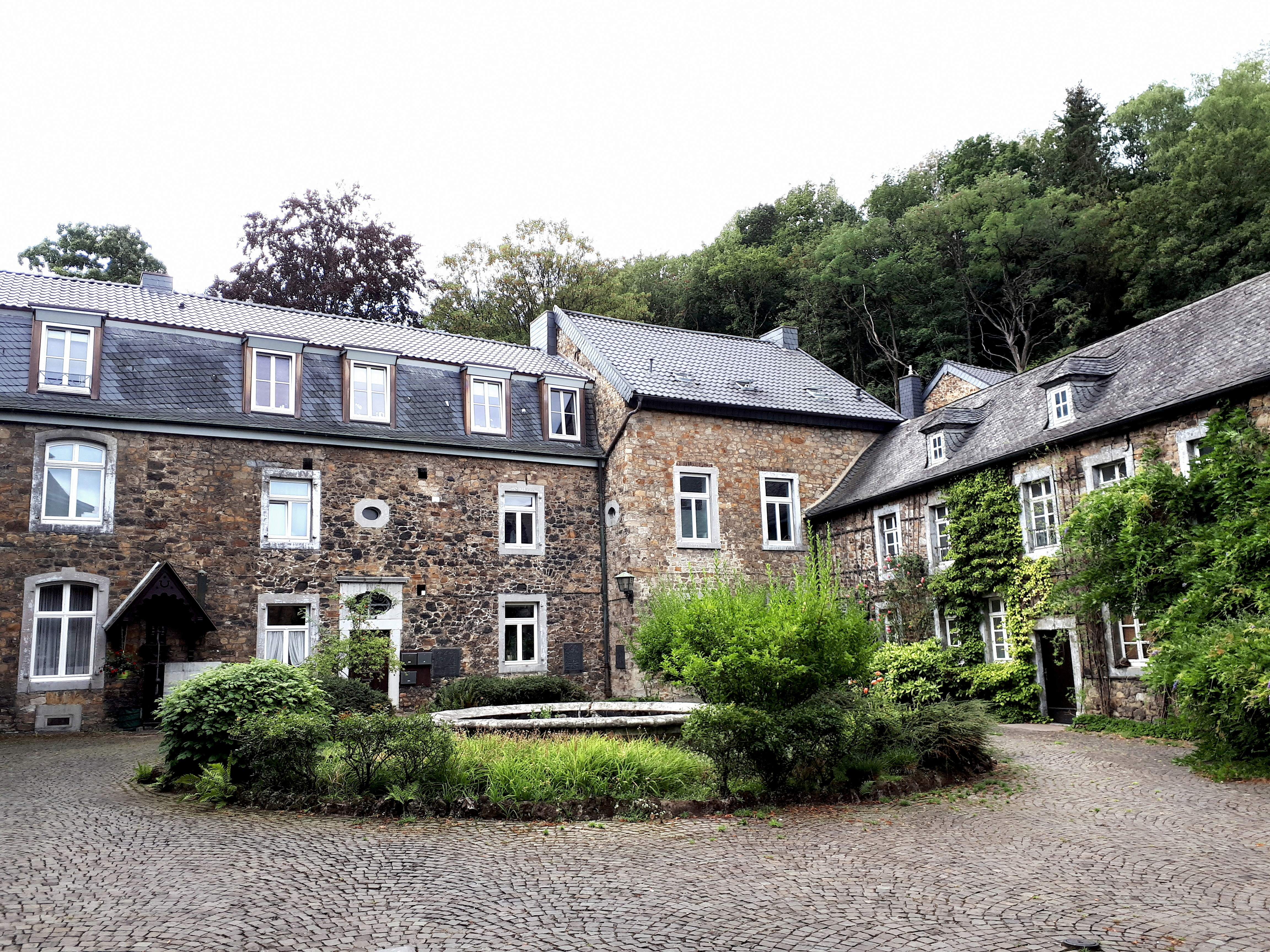 Innenhof des Kupferhofs Bleibtreu (Unterster Hof) in Stolberg